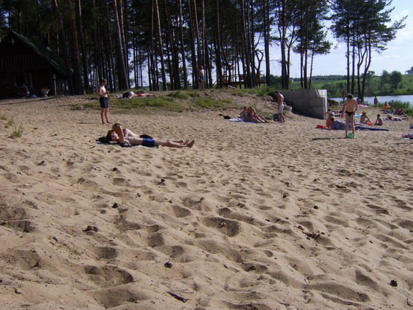 Kūlių tvenkinys – yra Vilniaus rajone, Kūlių kaime Foto: Tomaš Staševskij